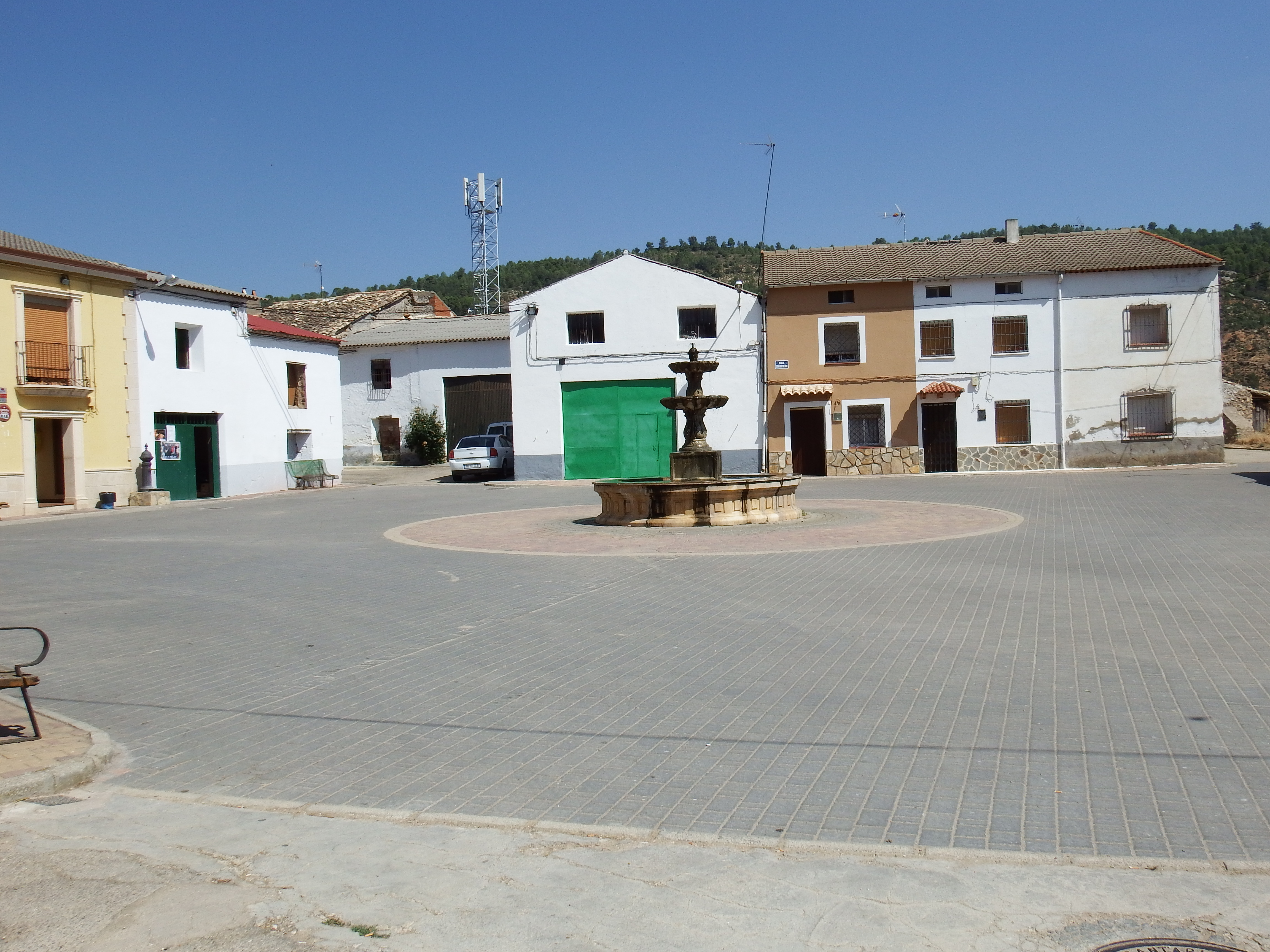 Villarejo de la Peñuela, plaza principal del pueblo.